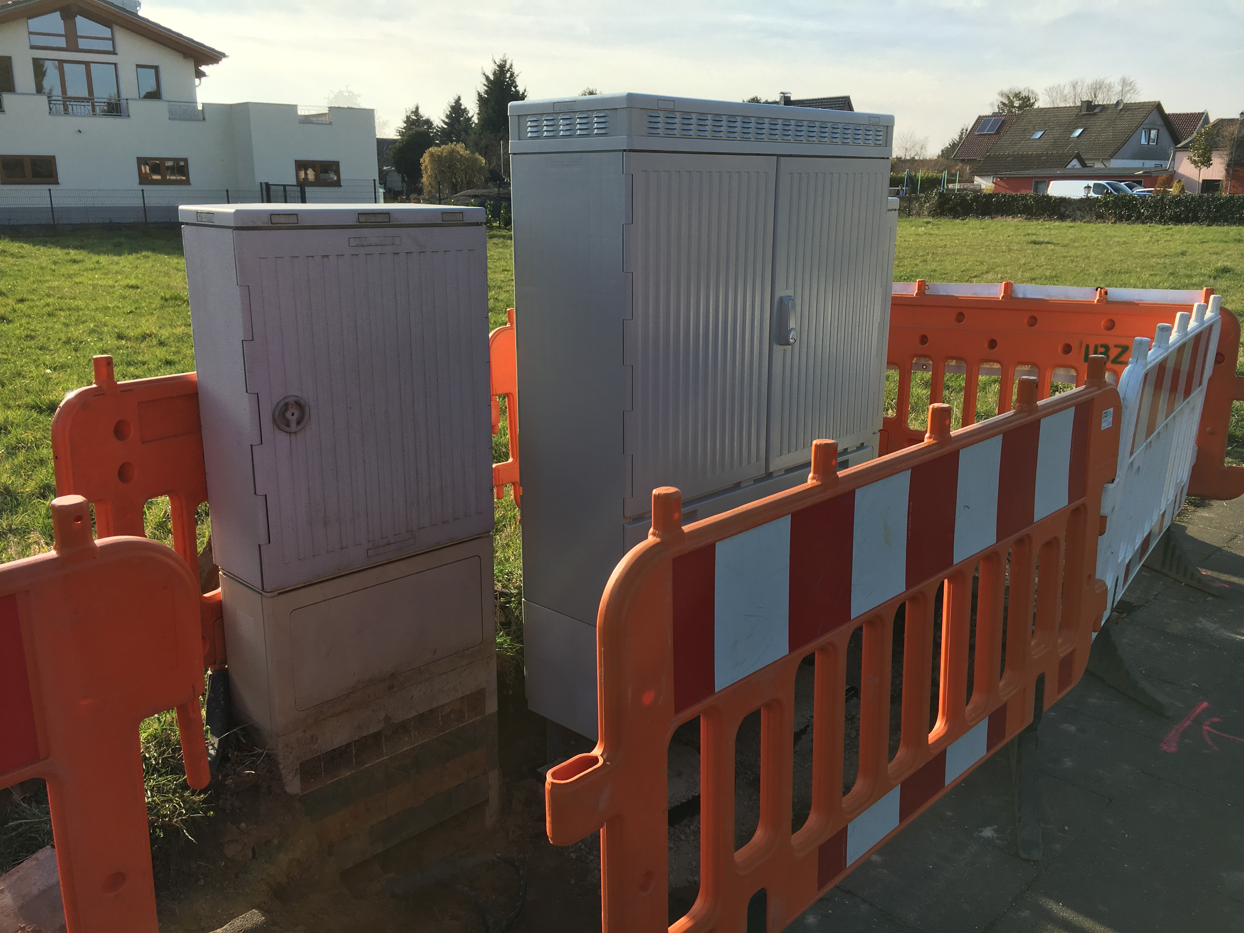 Breitbandausbau durch das Unternehmen t Blatzheim Networks Telecom GmbH im Euskirchener Stadtteil Kleinbüllesheim. Links zu sehen der alte Kabelverzweiger (KVz) der Telekom, der mit einem Querkabel mit dem neuen Multifunktionsgehäuse verbunden ist.